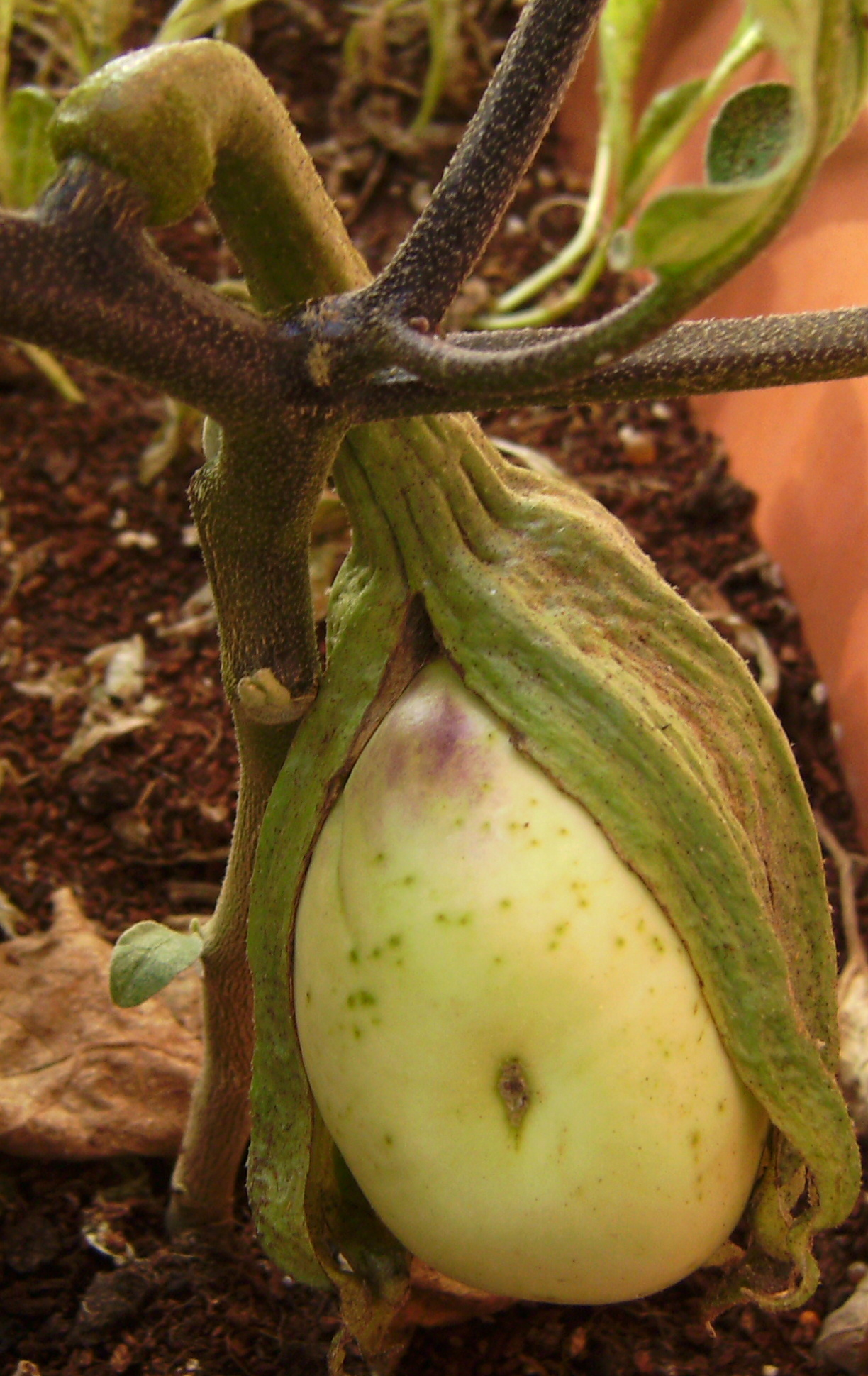 Albergínia del tipus d'Almagro en la planta